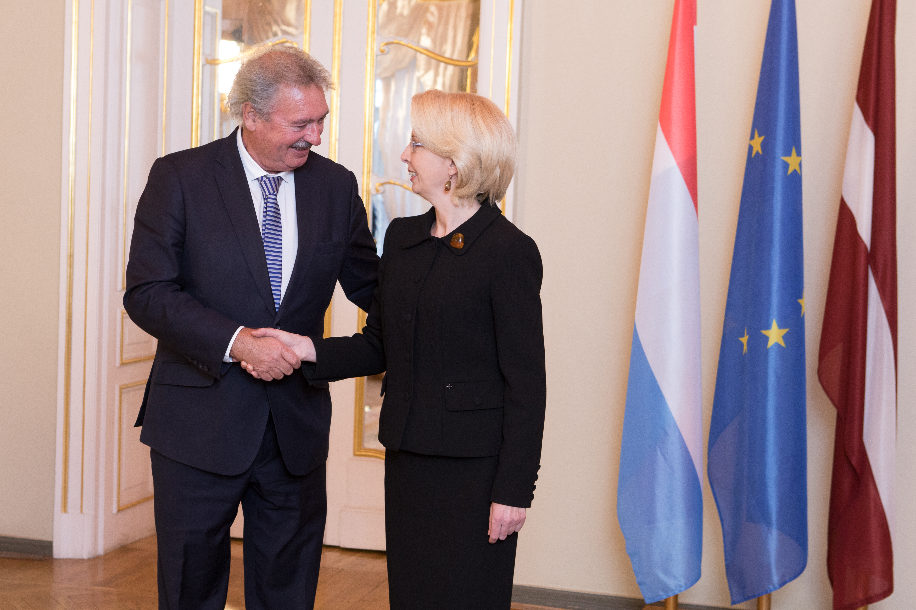 2017.gada 17.janvāris. Saeimas priekšsēdētāja Ināra Mūrniece tiekas ar Luksemburgas Lielhercogistes ārlietu un Eiropas lietu ministru Žanu Aselbornu (Jean Asselborn). Foto: Ernests Dinka, Saeimas Administrācija Izmantošanas noteikumi: saeima.lv/lv/autortiesibas